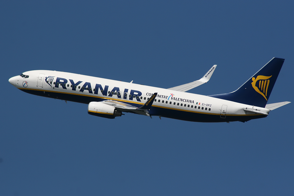 Boeing 737-8AS Ryanair